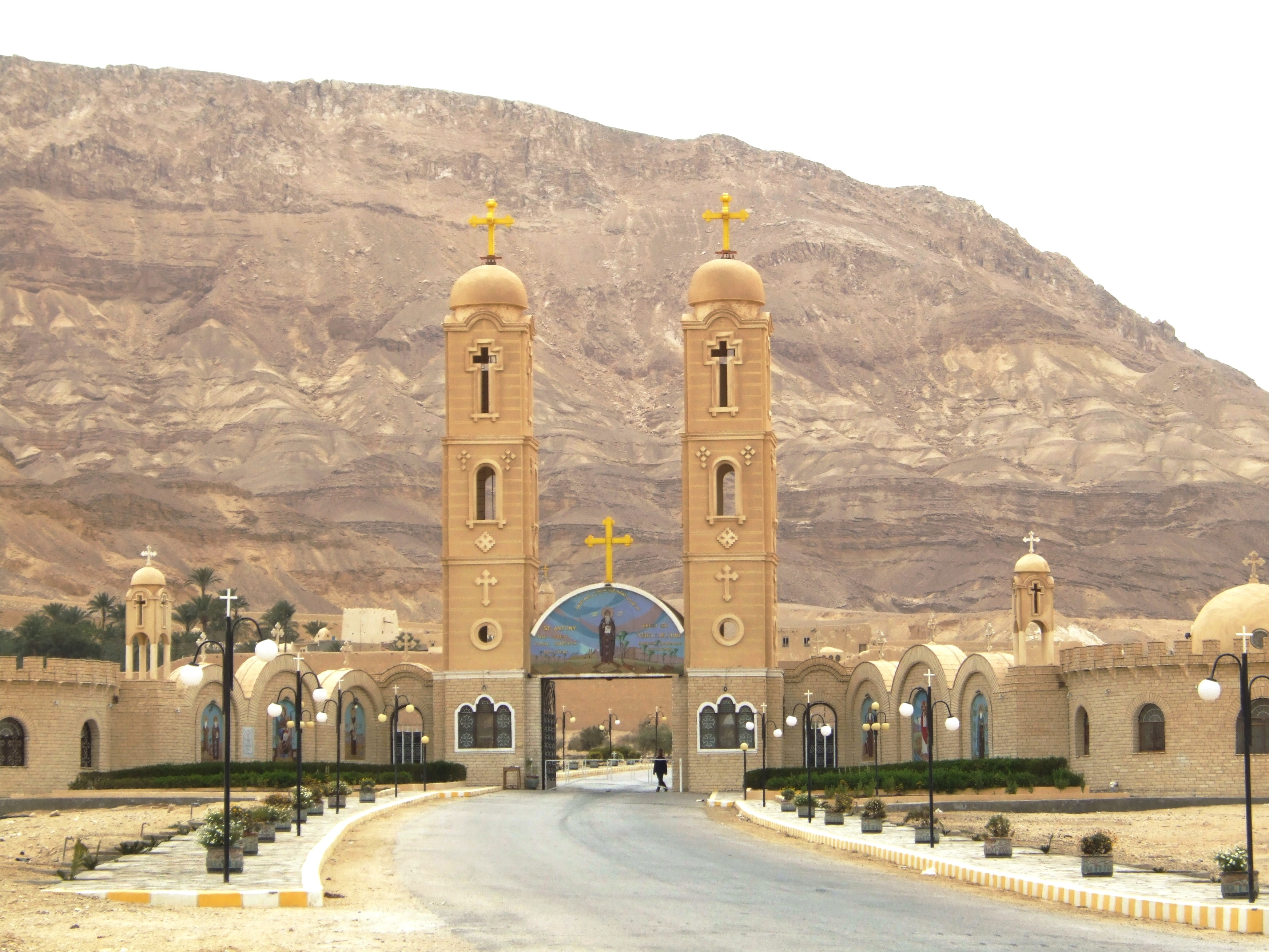 Sono l'autore دير_الأنبا_أنطونيوس Monastery of Saint Anthony Monaĥejo de Sankta Antonio Monastère Saint-Antoine Monastero di Sant'Antonio Klooster van Sint Antonius Монастир Святого Антонія Великого